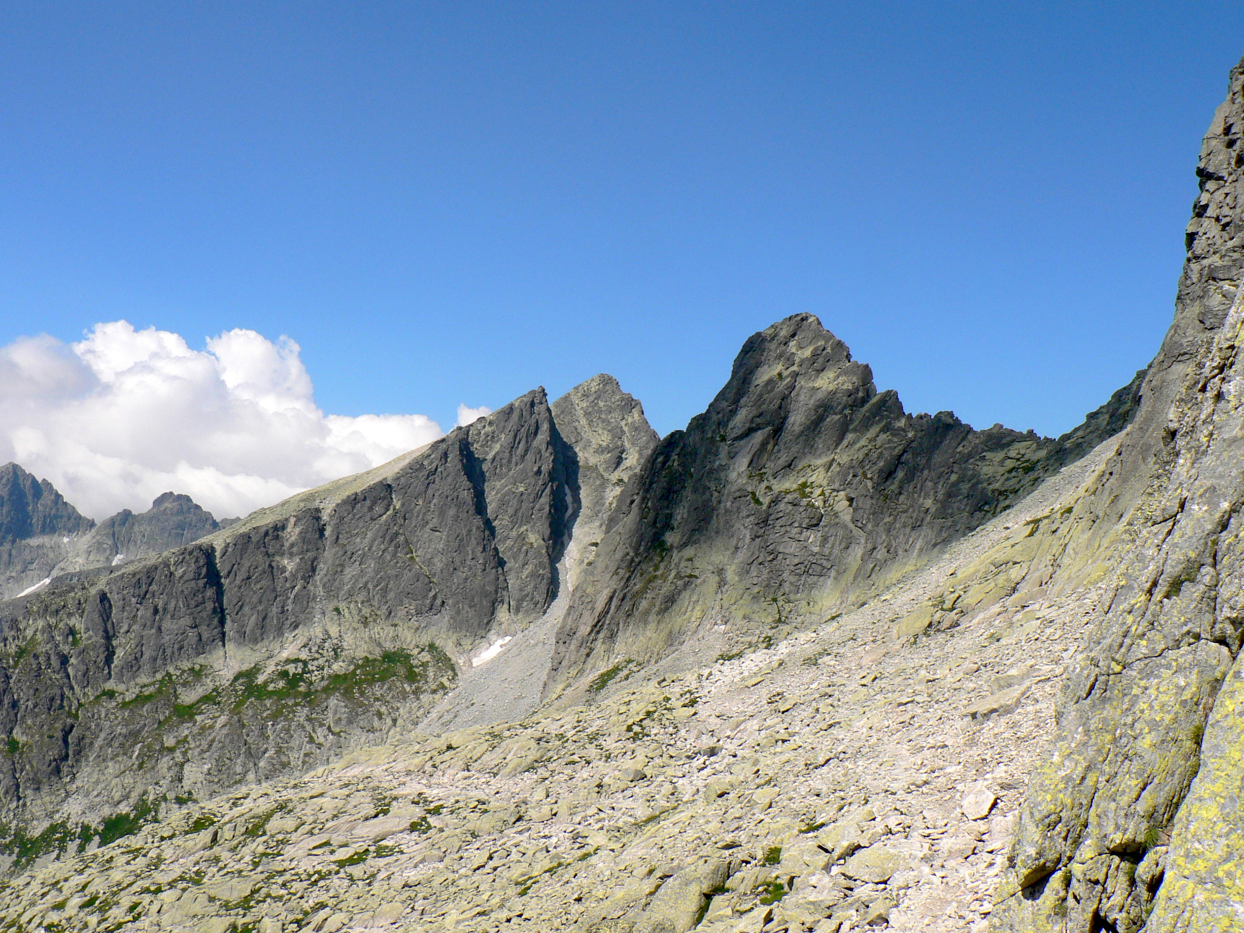 Od lewej Dzika Turnia, Jaworowy Szczyt, Ostry Szczyt, Biała Ławka